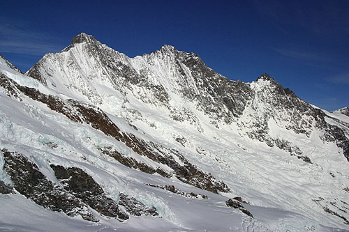 Täschhorn, Dom, Lenzspitze; Fee glacier.